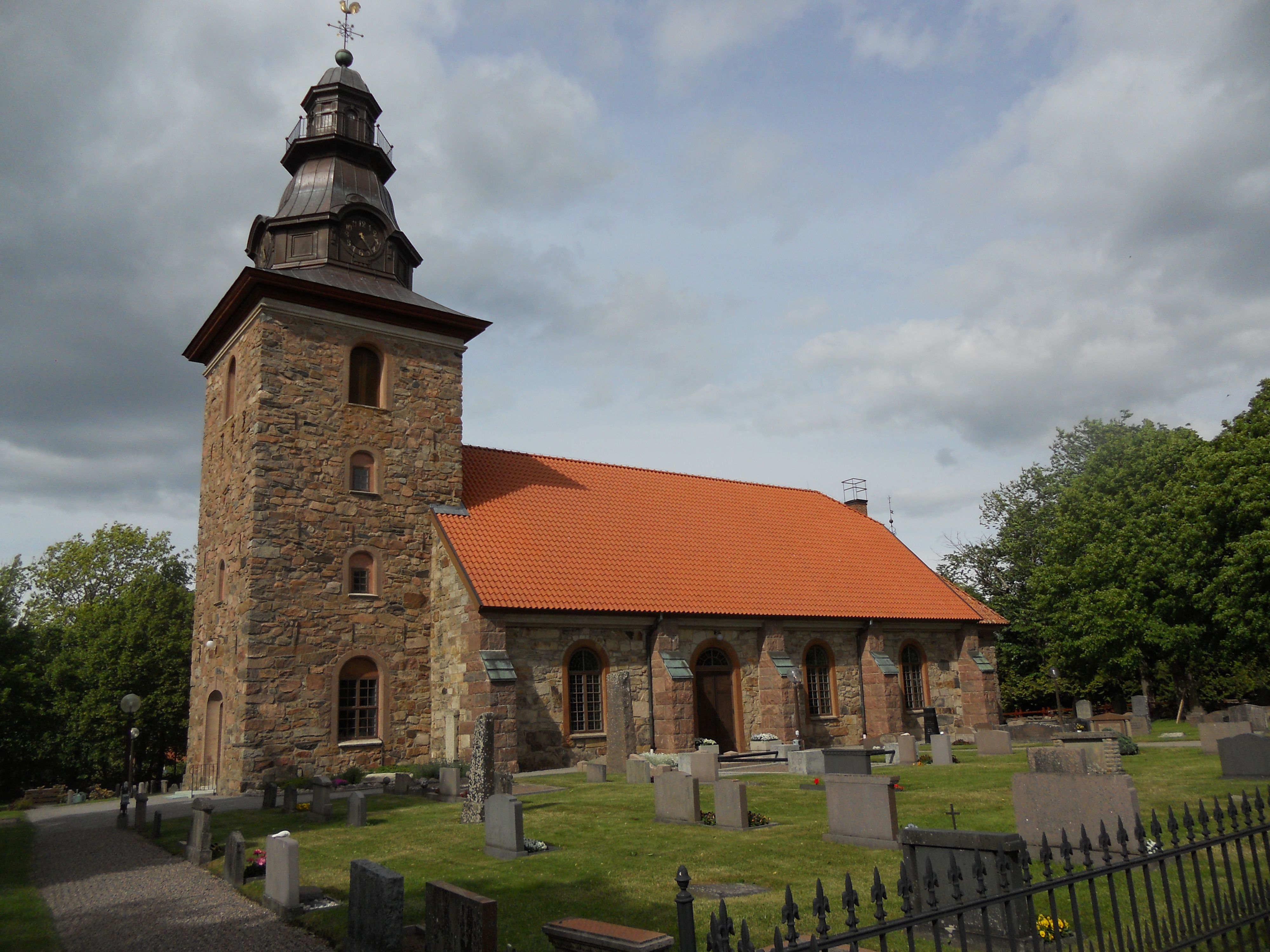 Björsäters kyrka, Lugnås församling i Skara stift, Mariestads kommun i Västergötland.